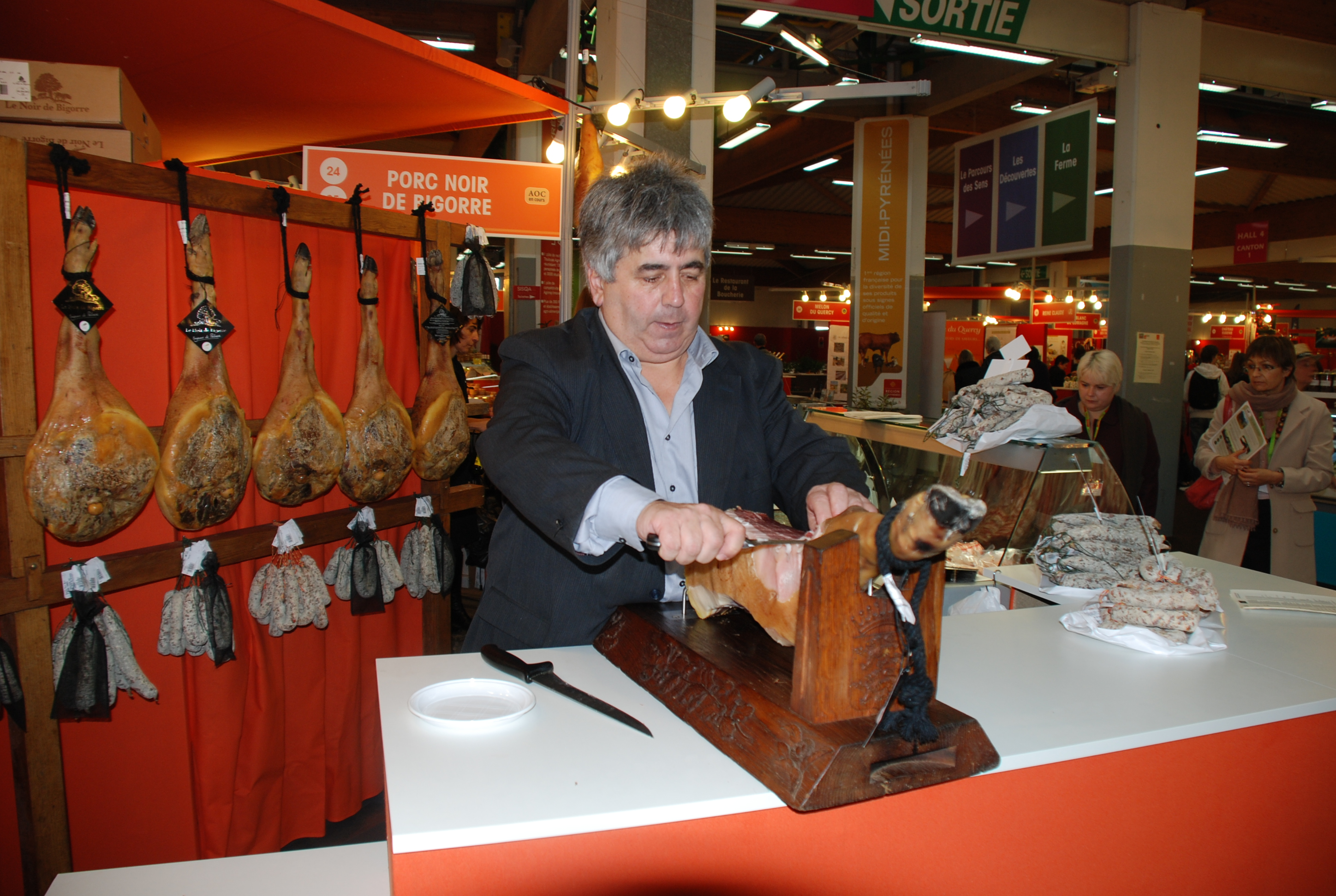 Stand du Noir de Bigorre SISQA 2013 :Armand Touzanne Directeur du Consortium Noir de Bigorre